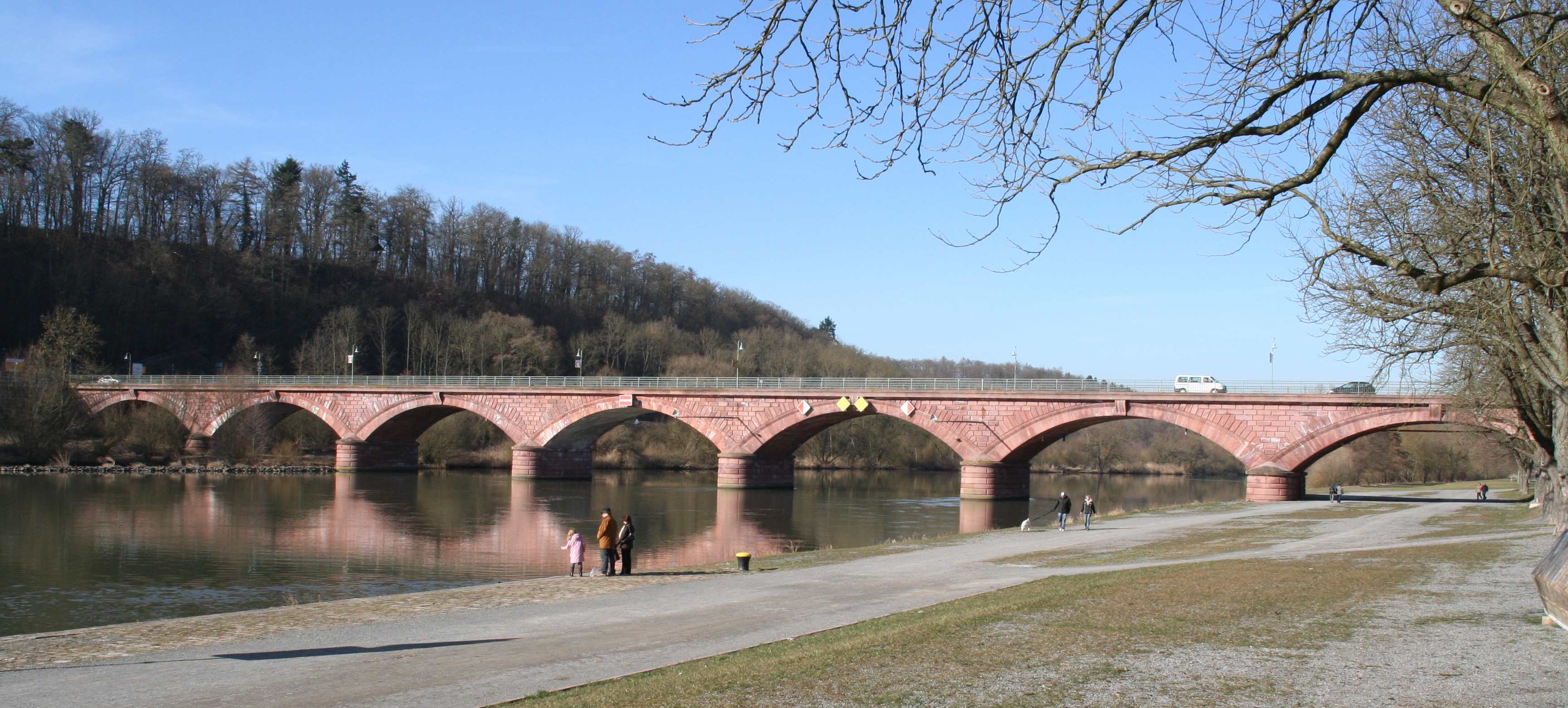 Alte Mainbrücke Marktheidenfeld, Main-Spessart-Kreis, in Unterfranken